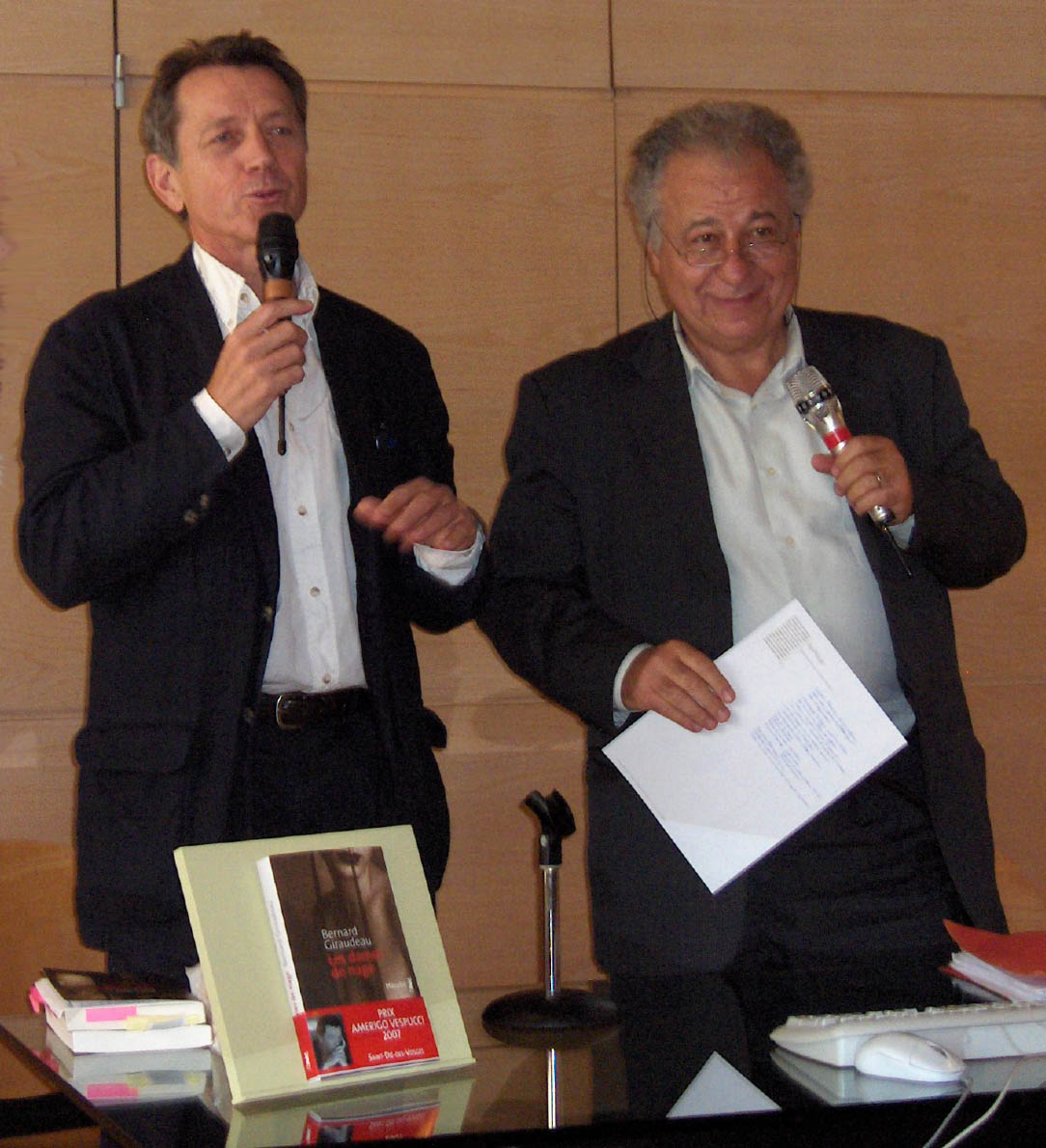 Bernard Giraudeau s'entretient avec Antoine Spire lors de la présentation de son roman Les Dames de nage, prix Amerigo-Vespucci au 18ème Festival international de géographie de Saint-Dié des Vosges